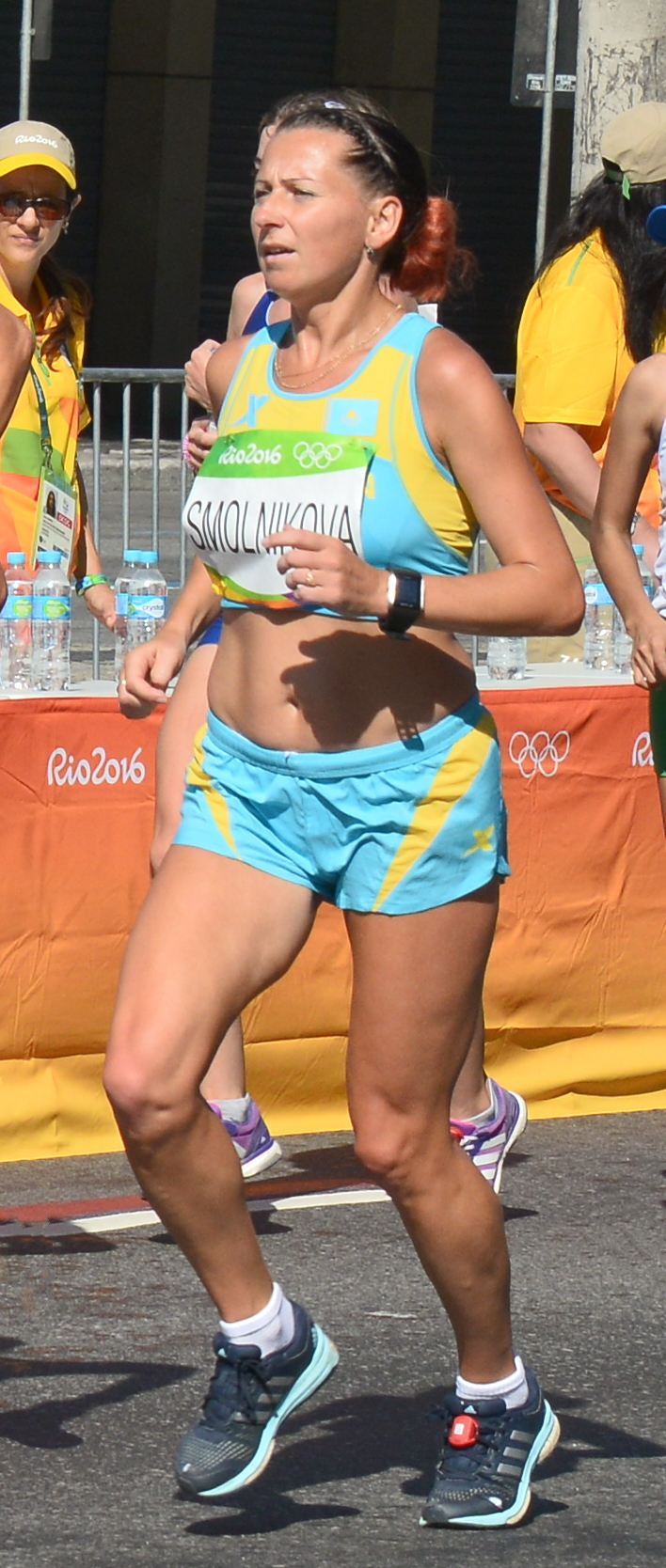 Passage du marathon des jeux olympiques de Rio 2016 dans le centre de Rio